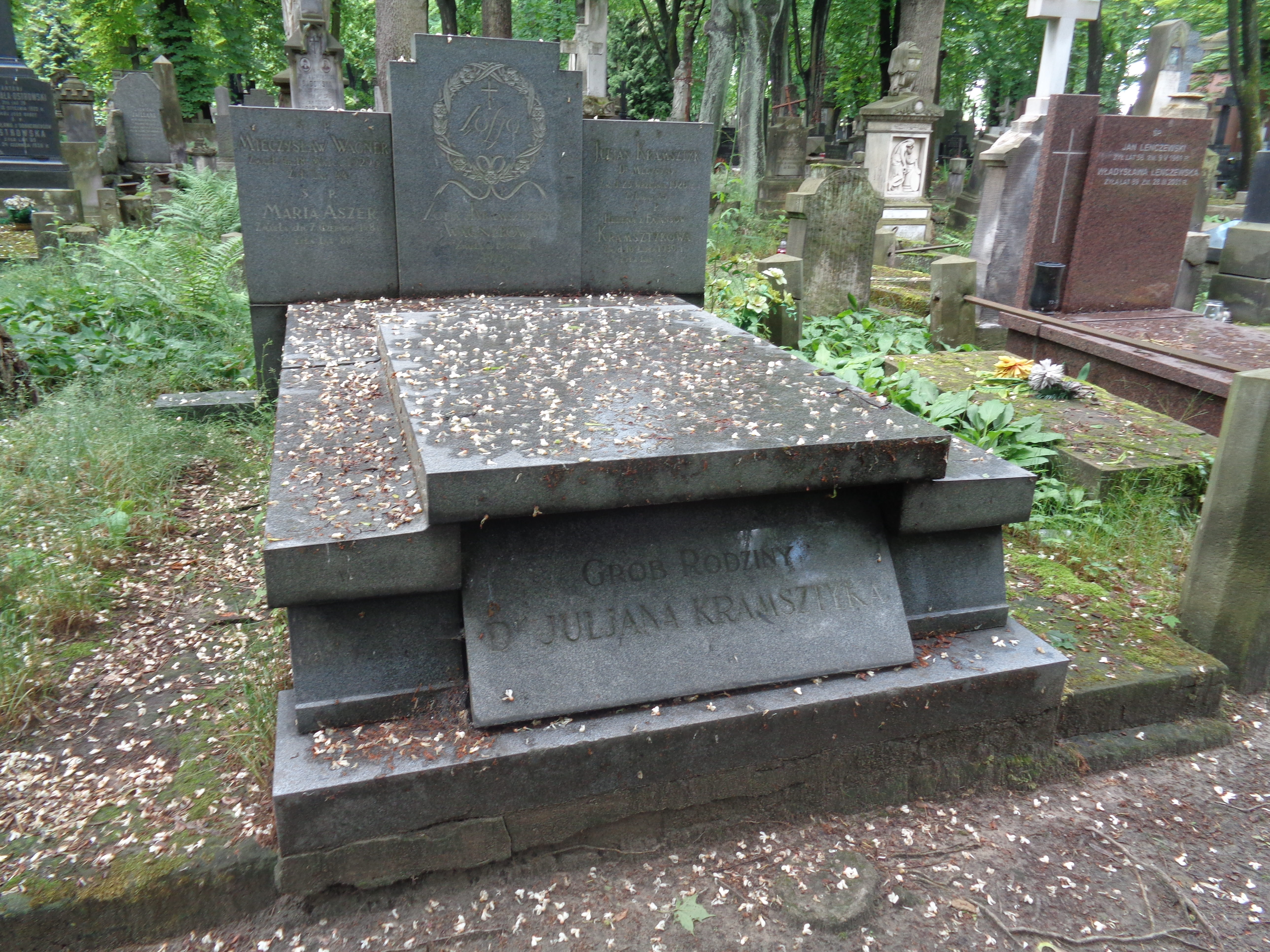 Grób Juliana Kramsztyka na Cmentarzu Powązkowskim